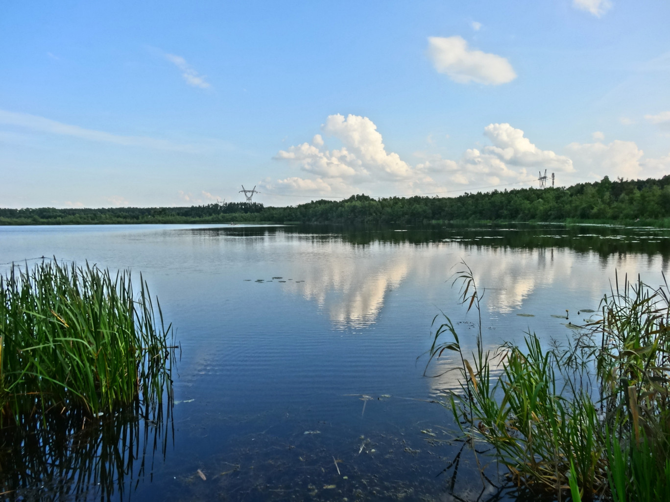 Jezioro Jezuickie Małe k. Bydgoszczy w gminie Białe Błota